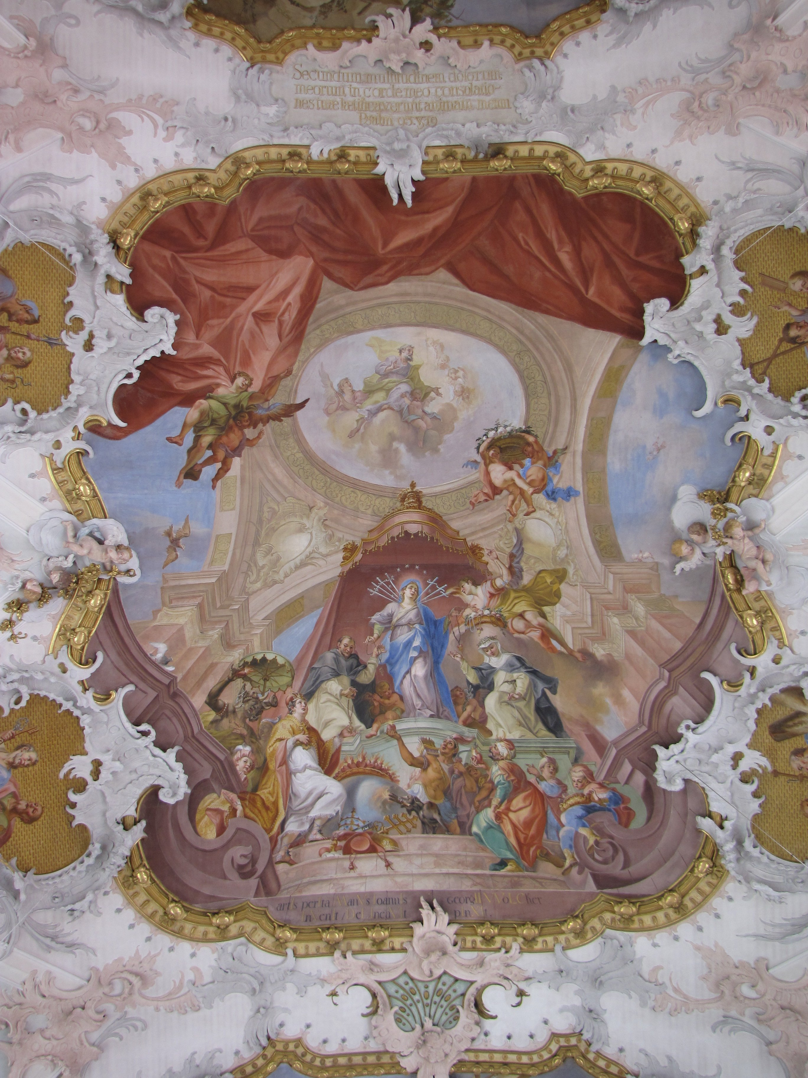 Deckenfresko von Johann Georg Wolcker in der Pfarrkirche von Oberostendorf